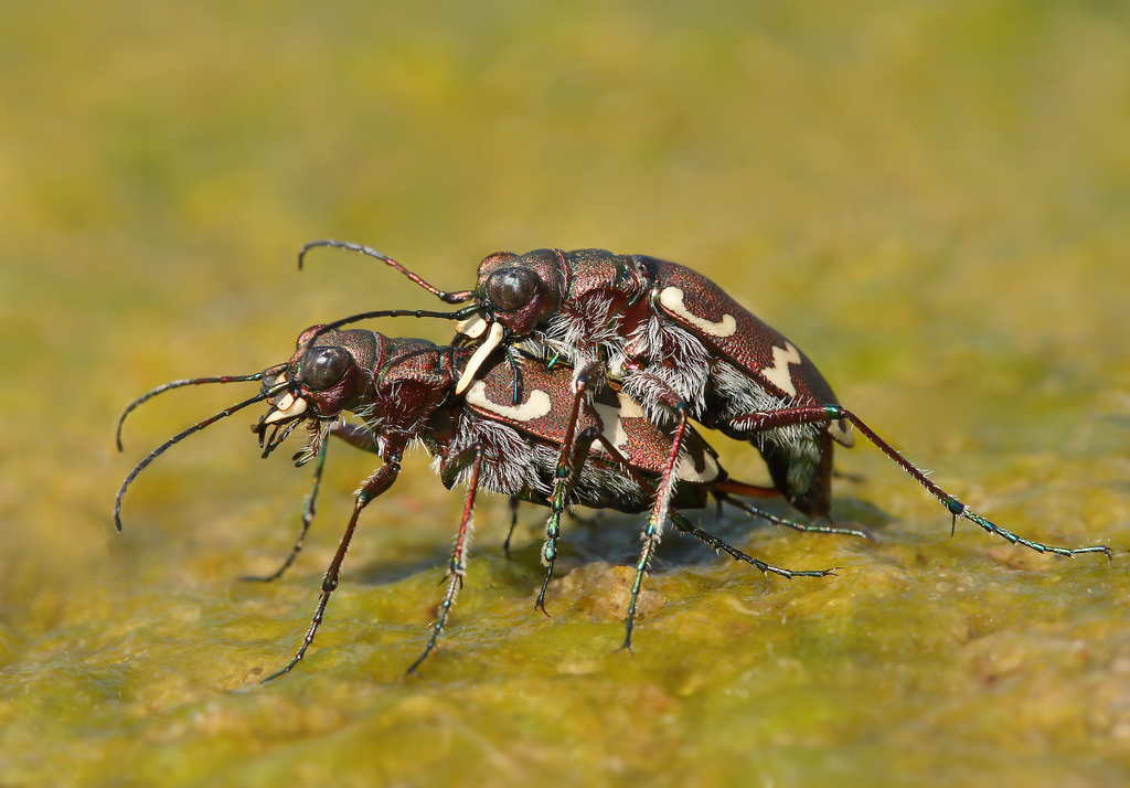 Bugs - Cicindela hybrida